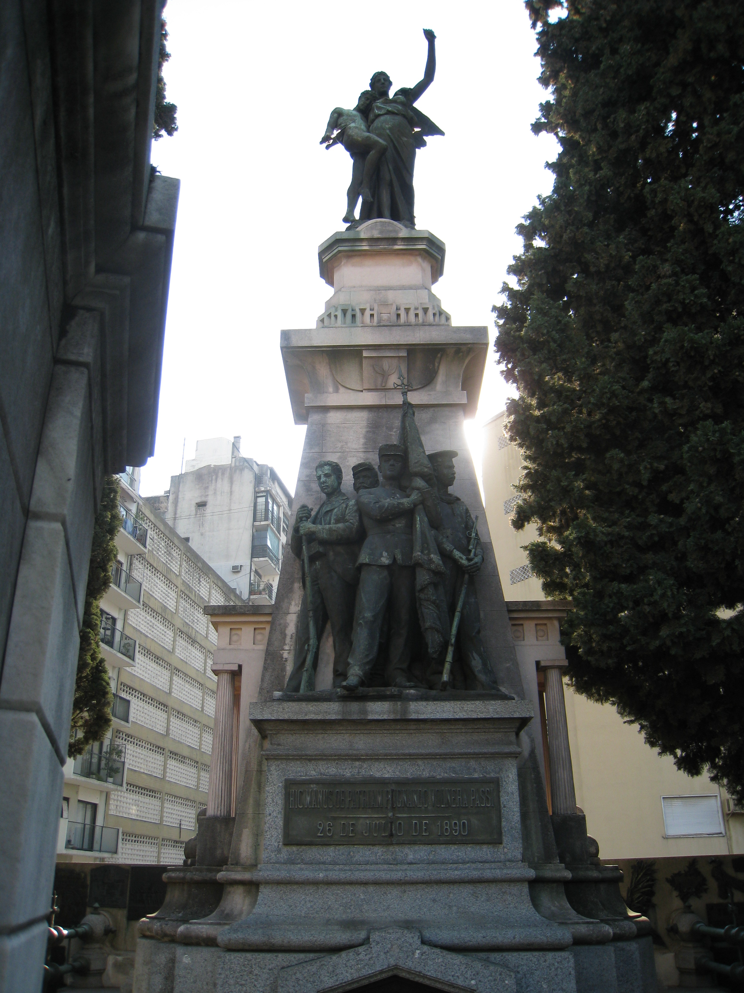 Panteón de los Caidos en la Revolución de 1890, Cementerio de la Recoleta, Buenos Aires, Argentina. Inscripciones: HIC MANUS OB PATRIAM PUGNANDO VOLNERA PASSI --- 26 DE JULIO DE 1890 Aqui descansan Leandro N. Alem Jefe de la Revolución de 1890 Fundador de la union civica radical Hipolito Irioyen Presidente de la Republica 1916-1922 - 1928-1930 Elpidio Gonzales Vicepresidente de la Republica 1922-1928 Arturo U. Illia Presidente de la Republica 1963-1966